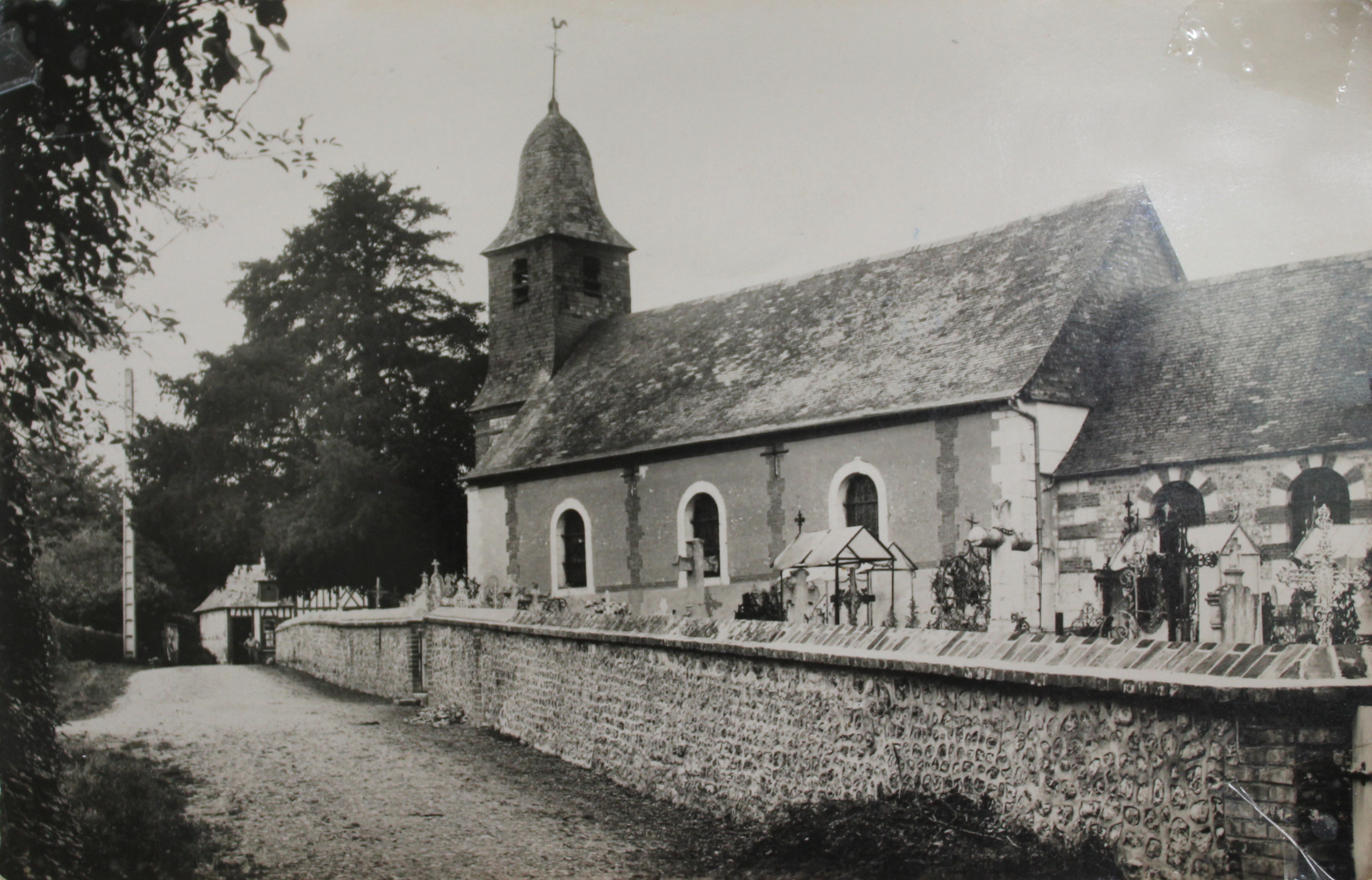 Manneville-sur-Risle Eglise de Manneville sur Risle.